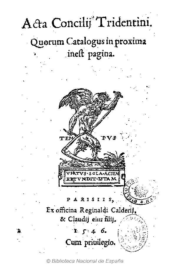 Acta Concilij Tridentini : quorum catalogus in proxima inest pagina Fecha: 1546 Datos de edición: Parisiis ex officina Reginaldi Calderij, & Claudij eius filij